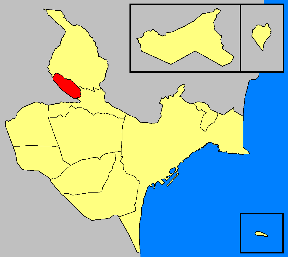 Entidades de población del término municipal de Alicante